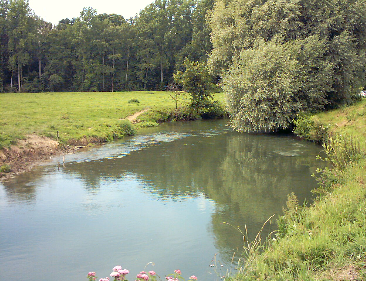 L'Aa à Arcques (Basse Meldycke)